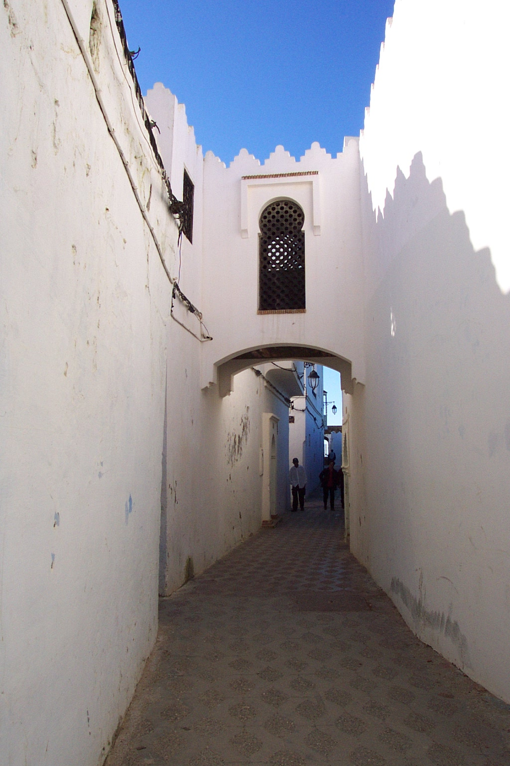 Calles de Arcila Calles de Asilah, Marruecos